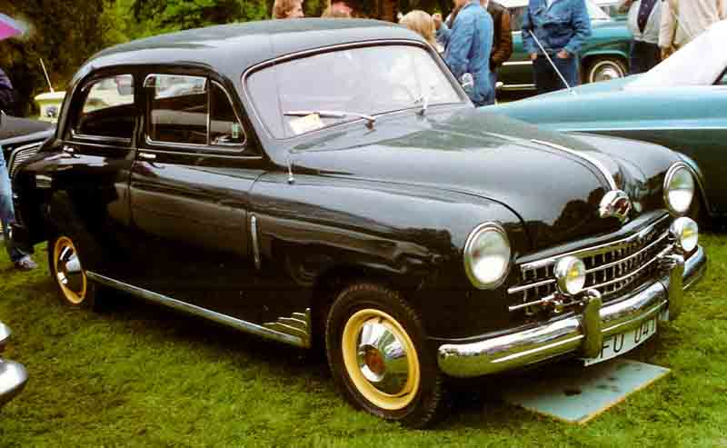 Fiat 1400 Berlina 1951